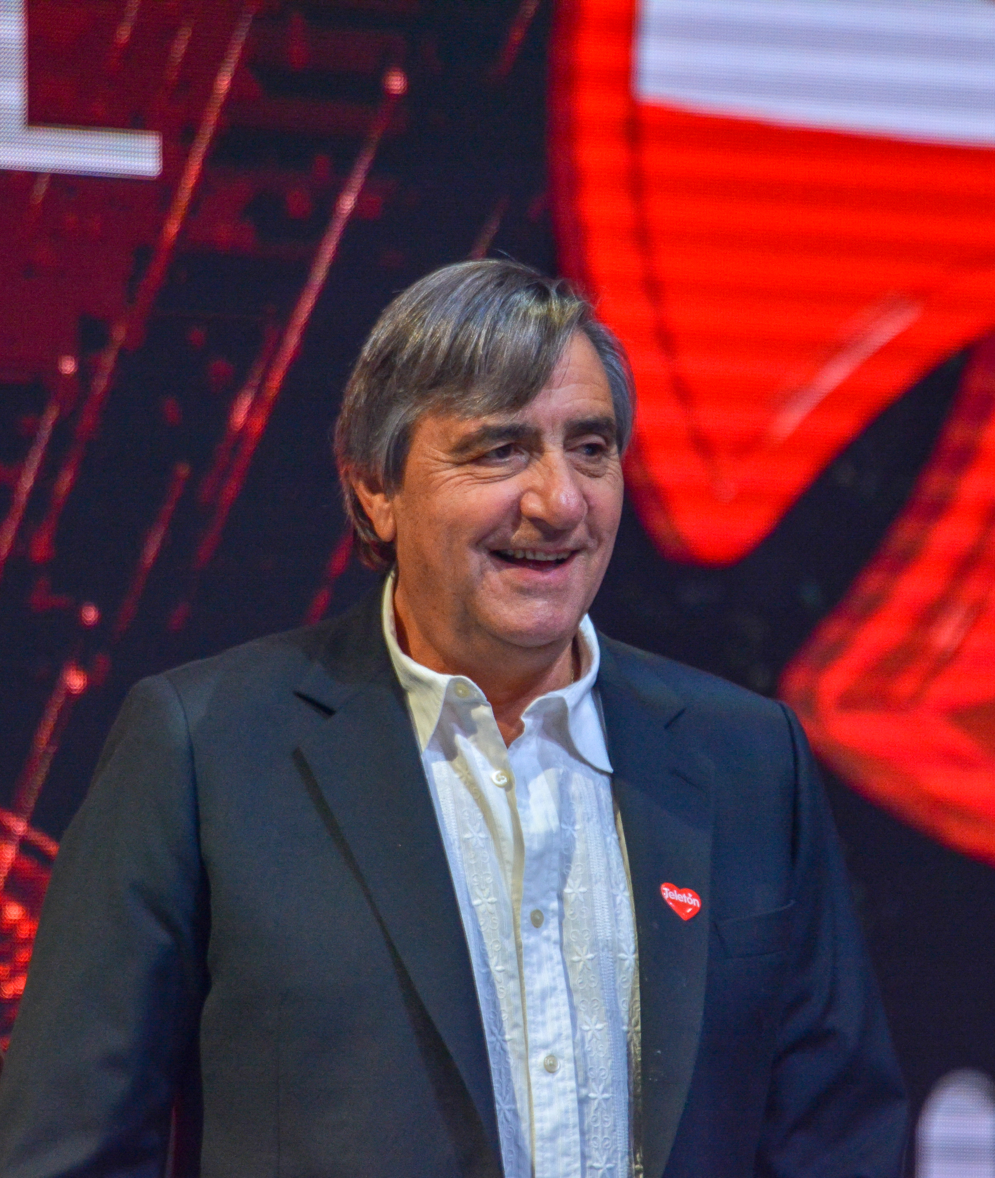 Teletón 2017